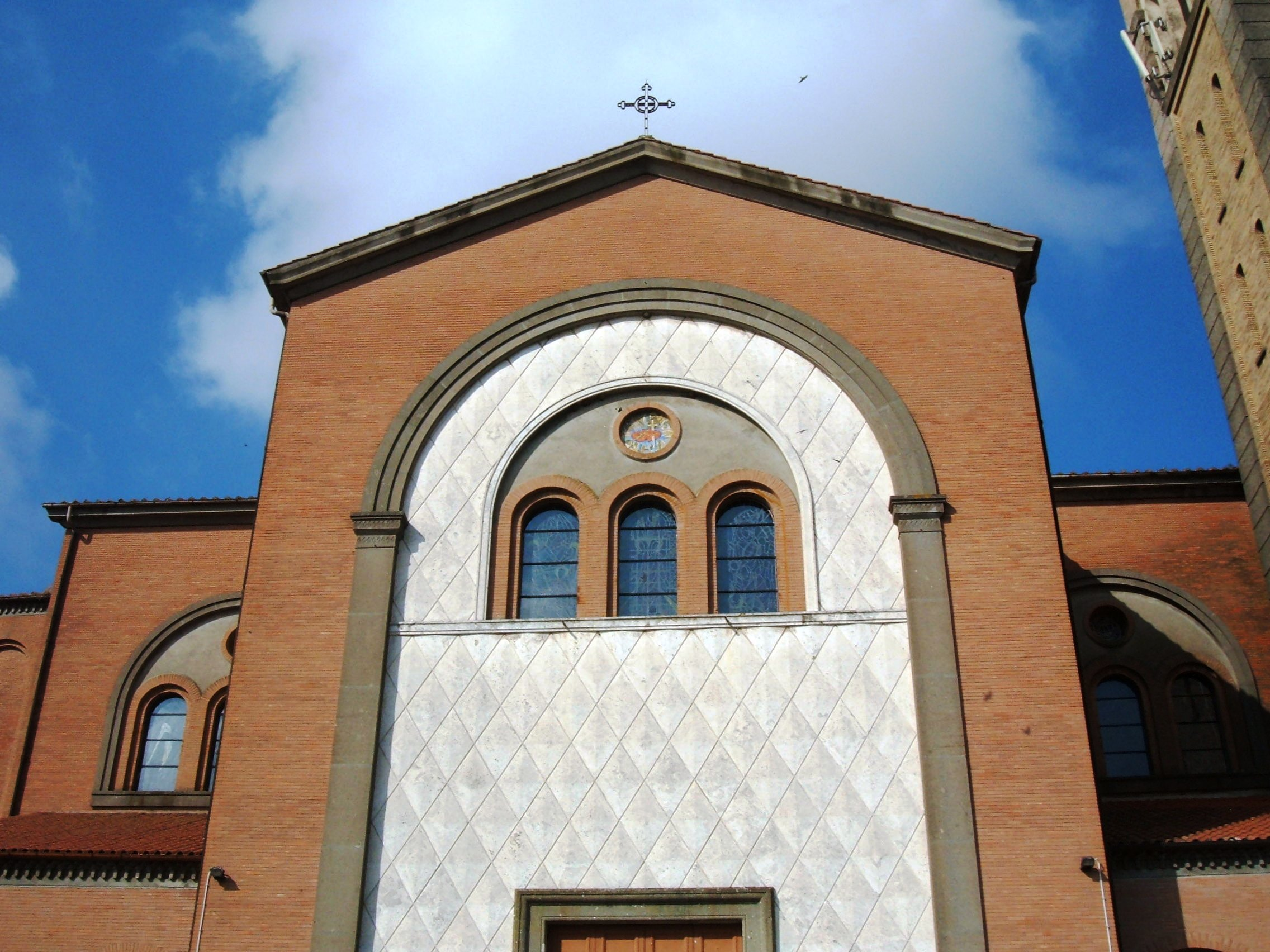 Cattedrale dei Sacri Cuori di Gesù e Maria, a Roma, in zona La Storta, sulla via Cassia. Chiesa cattedrale della diocesi suburbicaria di Porto-Santa Rufina.